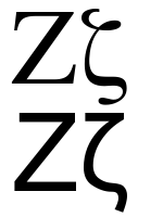 greek letter zeta